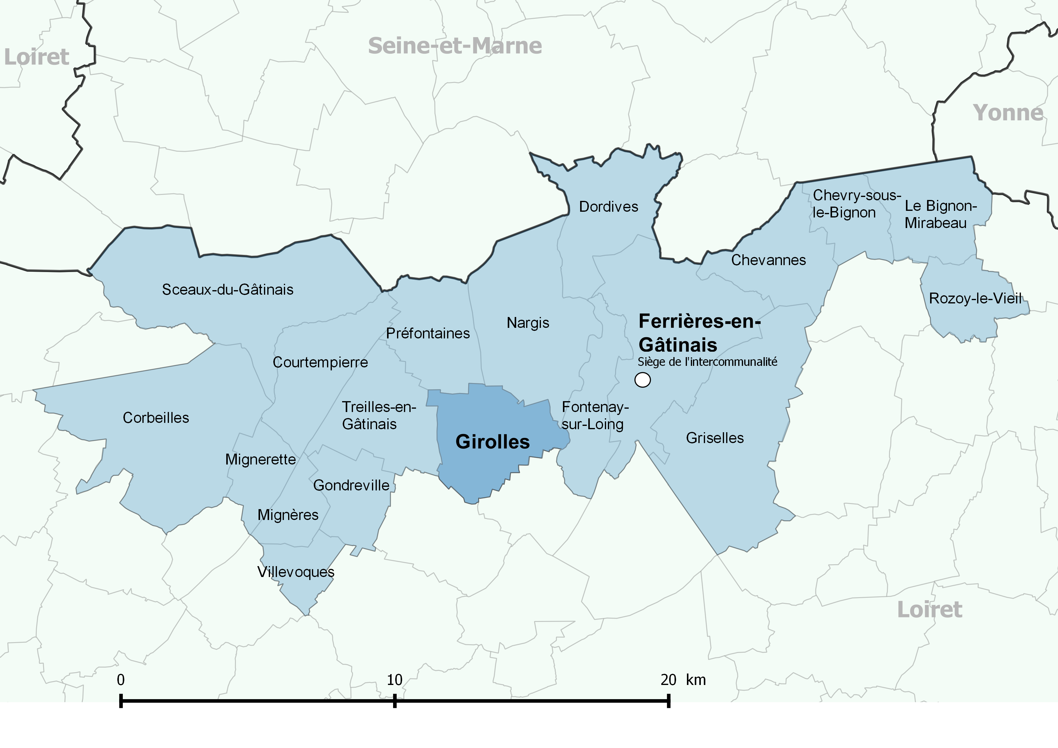 Périmètre de la communauté de communes des Quatre Vallées (Loiret) - Positionnement de la commune de Girolles.